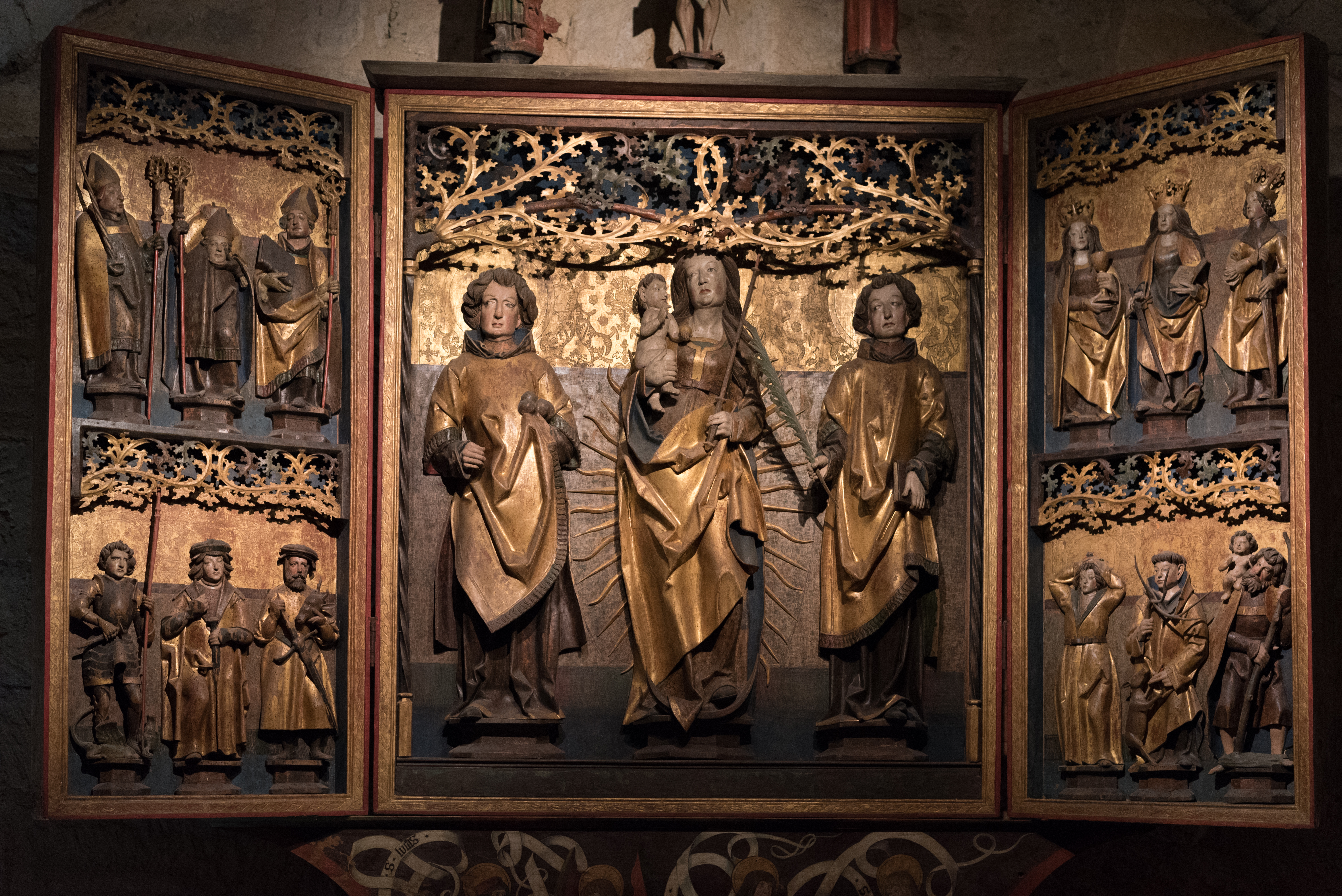 Naumburg, Dom, Domschatzkammer, Vierzehn Nothelfer Altar